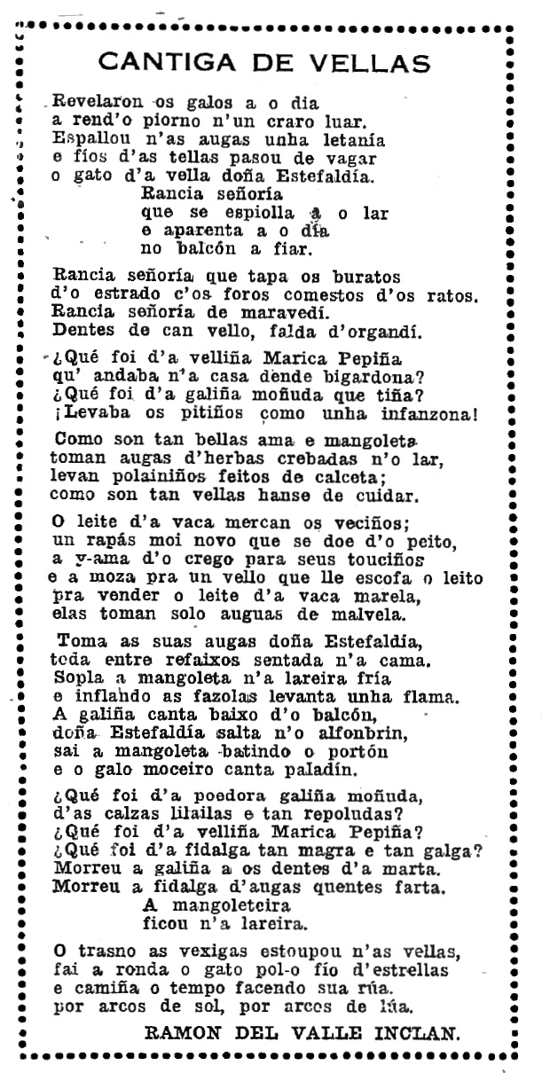 "Cantiga de vellas"